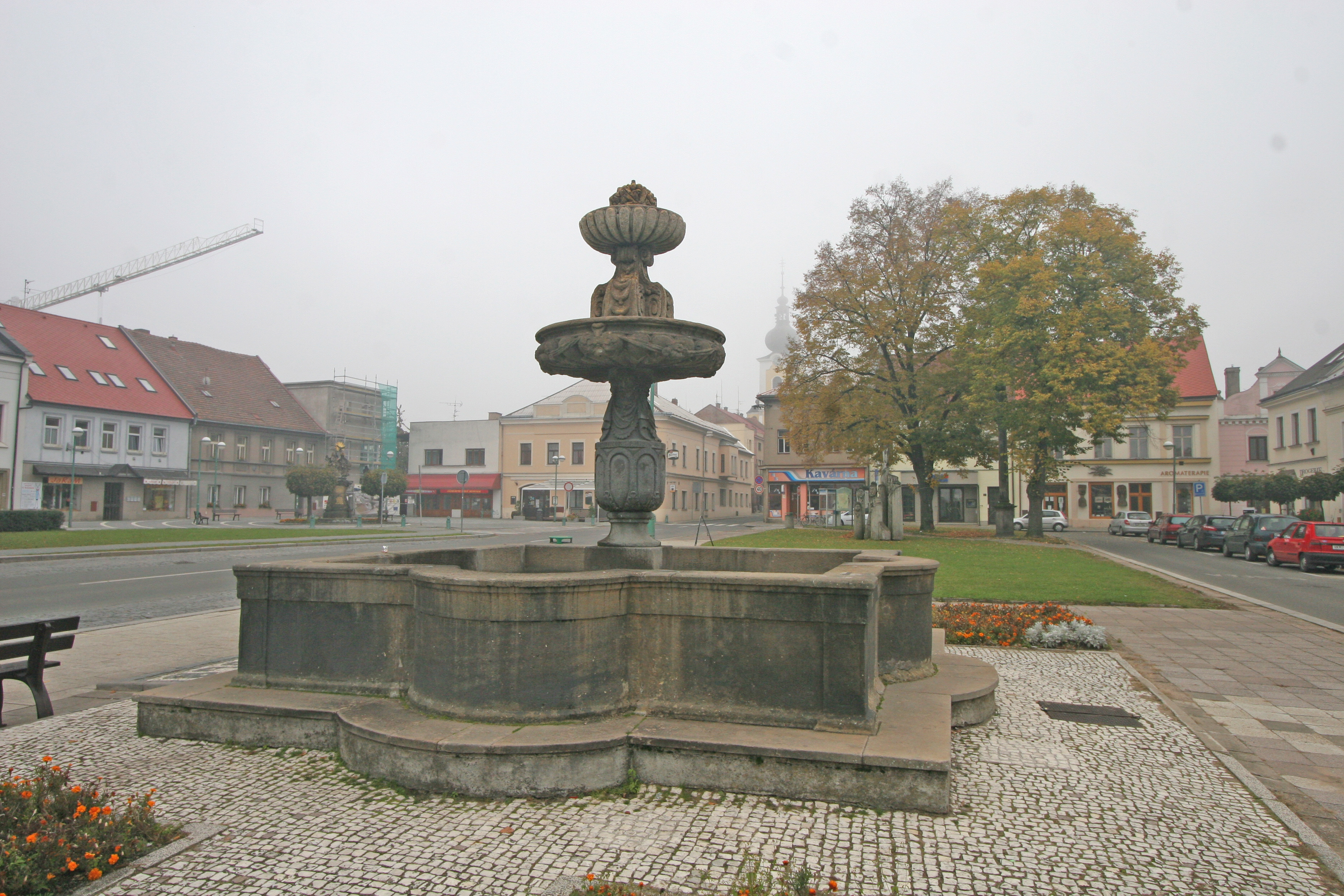 Kašna (Třebechovice pod Orebem), Masarykovo nám., Třebechovice pod Orebem